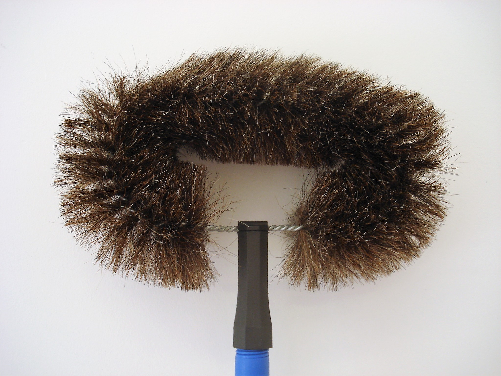 Tête-de-loup, Balai toiles d'araignées